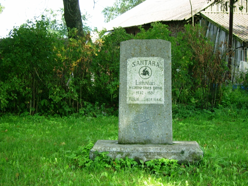 Santaros stela Rukuose